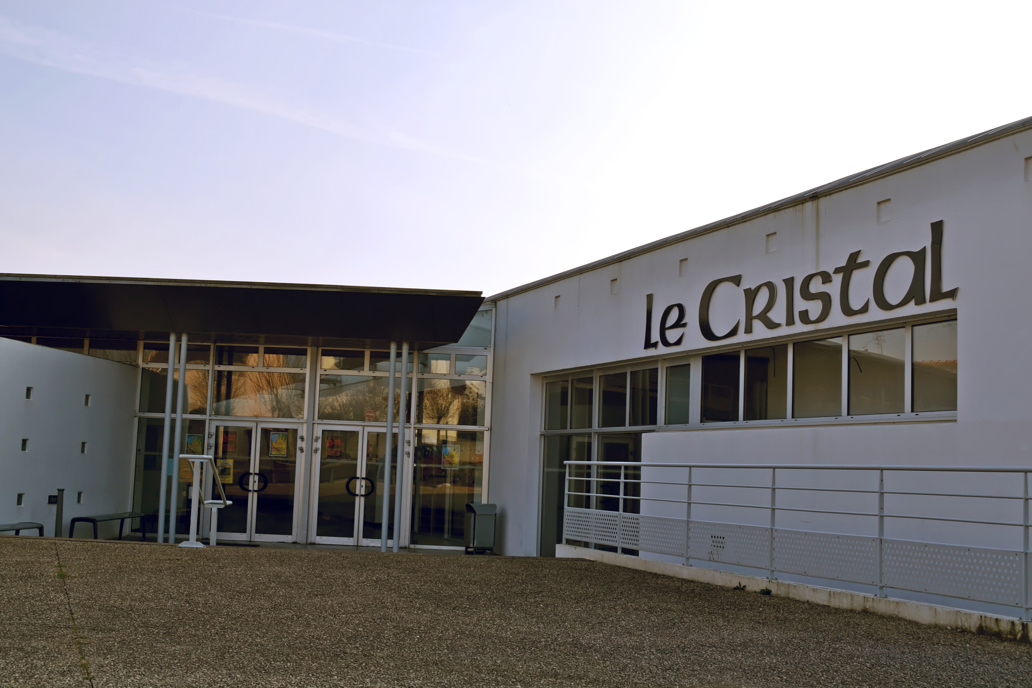 Le Cristal, salle de spectacle à Plouénan (Finistère, Bretagne).